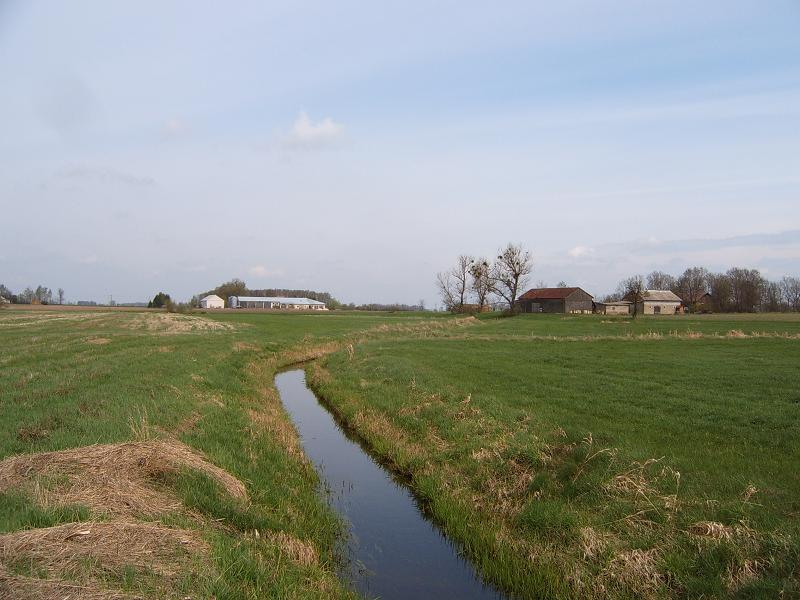 Milewo-Gawary, rzeka Pełta